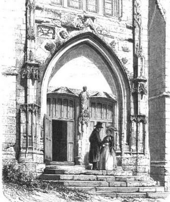 Gravure représentant le portail de l'église Saint-Symphorien de Fondettes vers la fin du XIXe siècle. Œuvre exécutée par l'abbé Jean-Jacques Bourassé.